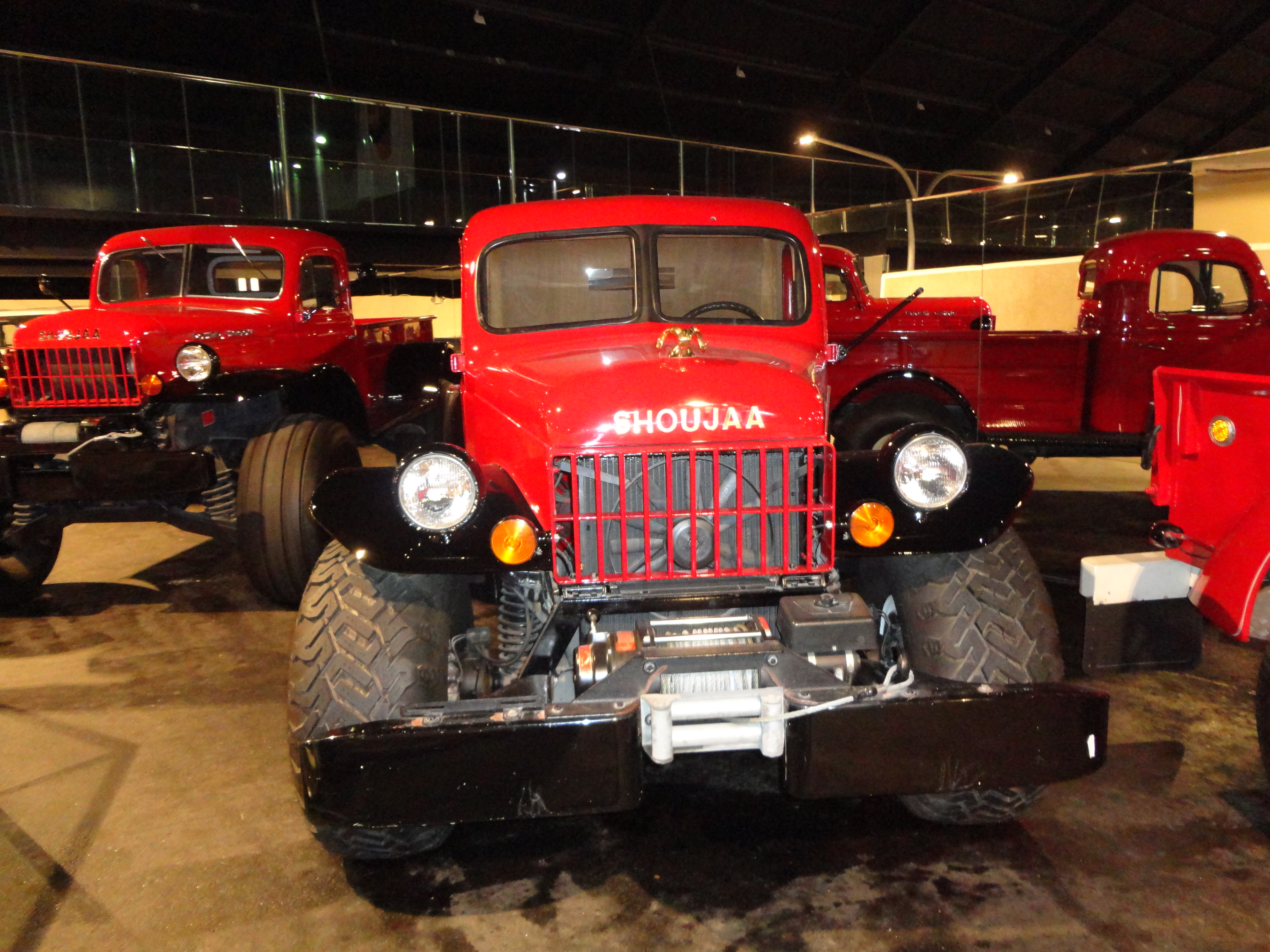 Shoujaa (شجاع) means brave